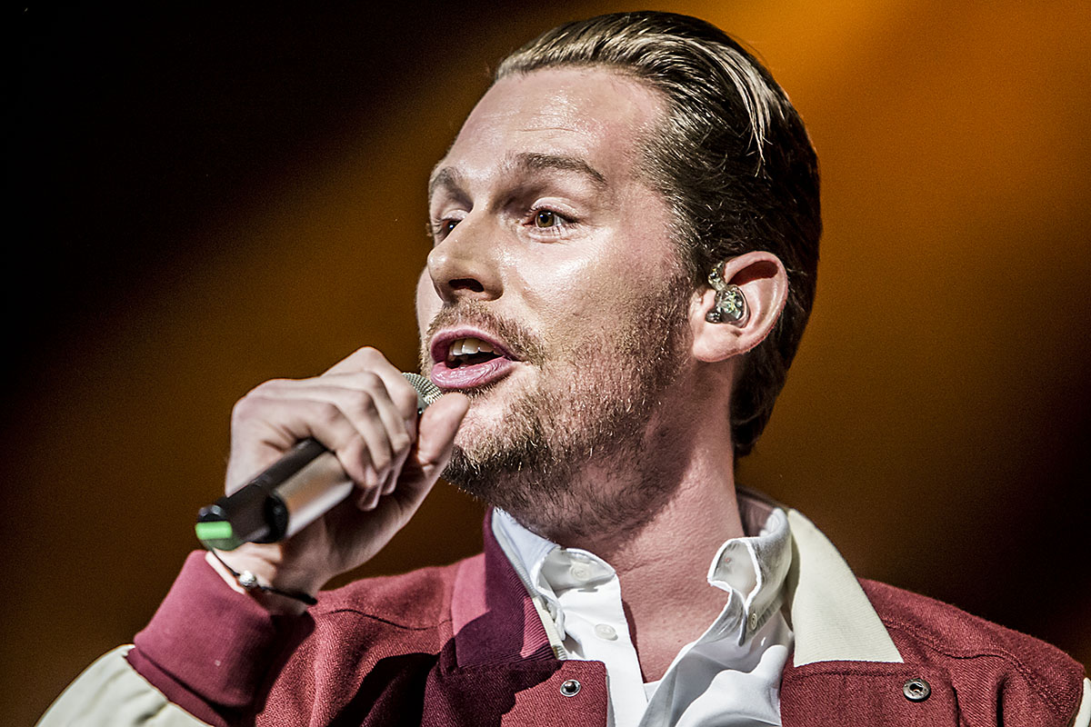 Rasmus Seebach i Falconer Salen 5. februar 2014